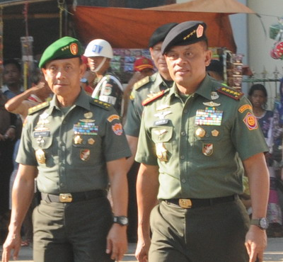 Jenderal TNI Gatot Nurmantyo Panglima TNI bersama Letjen TNI Mulyono KASAD saat berkunjung ke Ponpes Buntet, Kecamatan Astanajapura, Kabupaten Cirebon, Jawa Barat